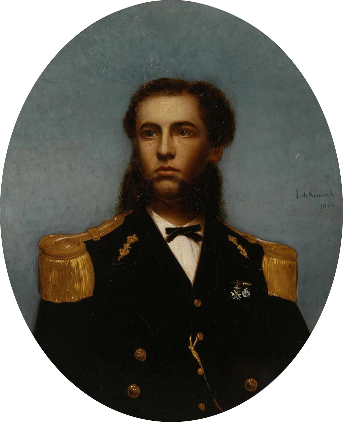 Paneelschildering. Het schilderij toont de latere vice-admiraal Quispel (1841-1921) als luitenant ter zee der 2e klasse. Quispel is geportretteerd 'ten halve lijve' en gekleed in het dagelijks tenue van een subaltern marine-offier. Hij draagt het ereteken van de Militaire Willemsorde en een 'Kruis voor Belankrijke Krijgsverrigtingen' op de borst.